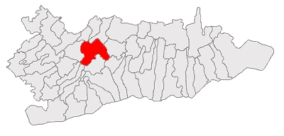 Categorie:Hărţi ale judeţului Călăraşi